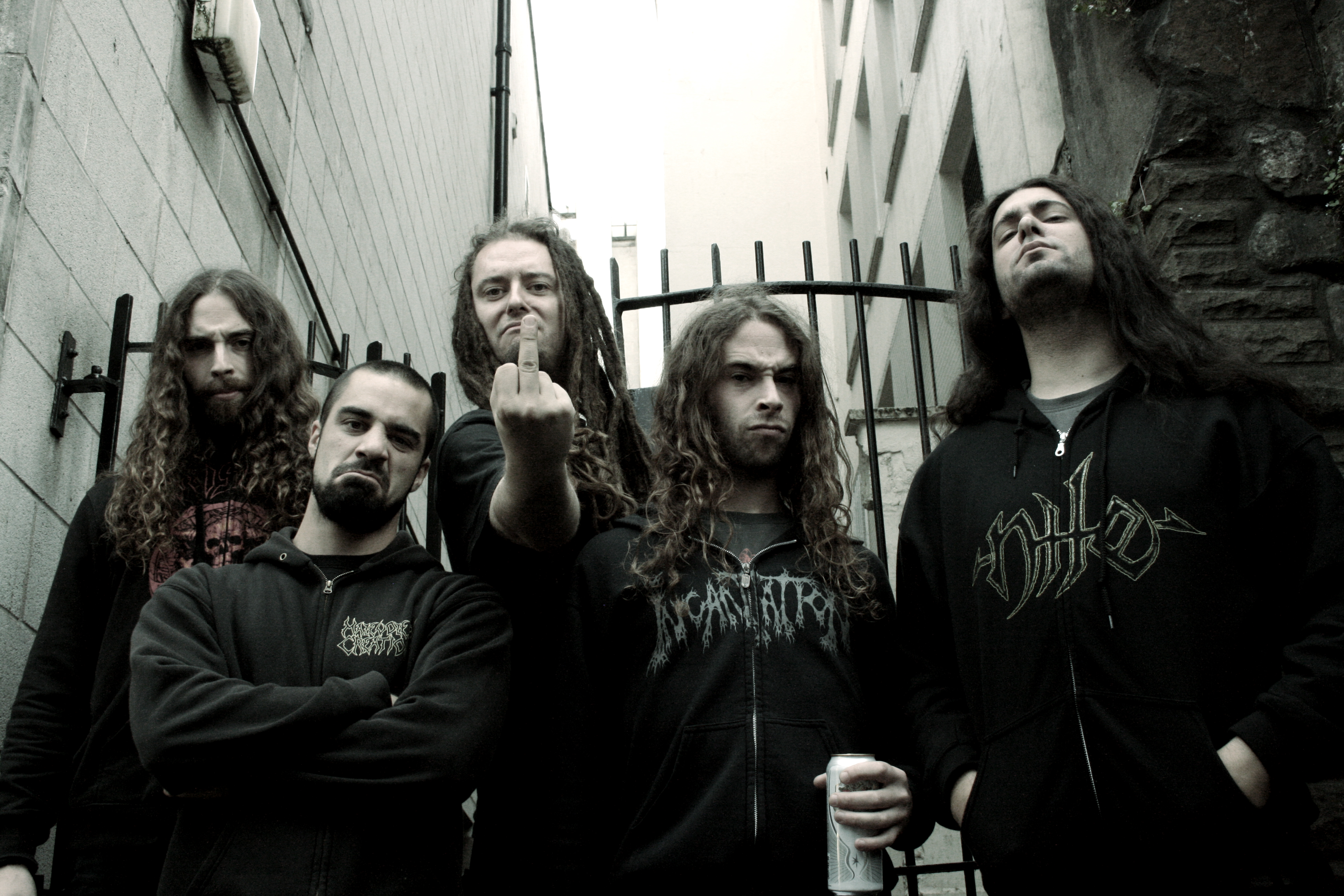 Band picture taken in Cardiff during European tour (2013)